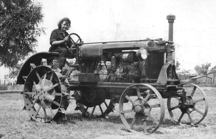 Rehfelde, Traktoristin ADN-ZB Traktoristin Franziska Küster auf einem Traktor der MAS Rehfelde. 3331-49 17.5.1949 Leiweise Illus Berlin W 8